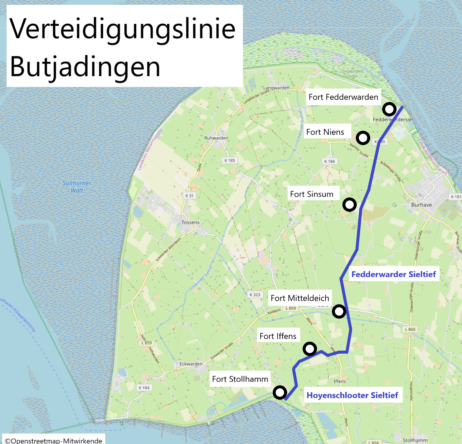 Lage der Forts in Butjadingen. Das Hayenschlooter und das Fedderwarder Sieltief bilden ein Wasserhindernis, hinter dem die sechs Forts angelegt wurden.